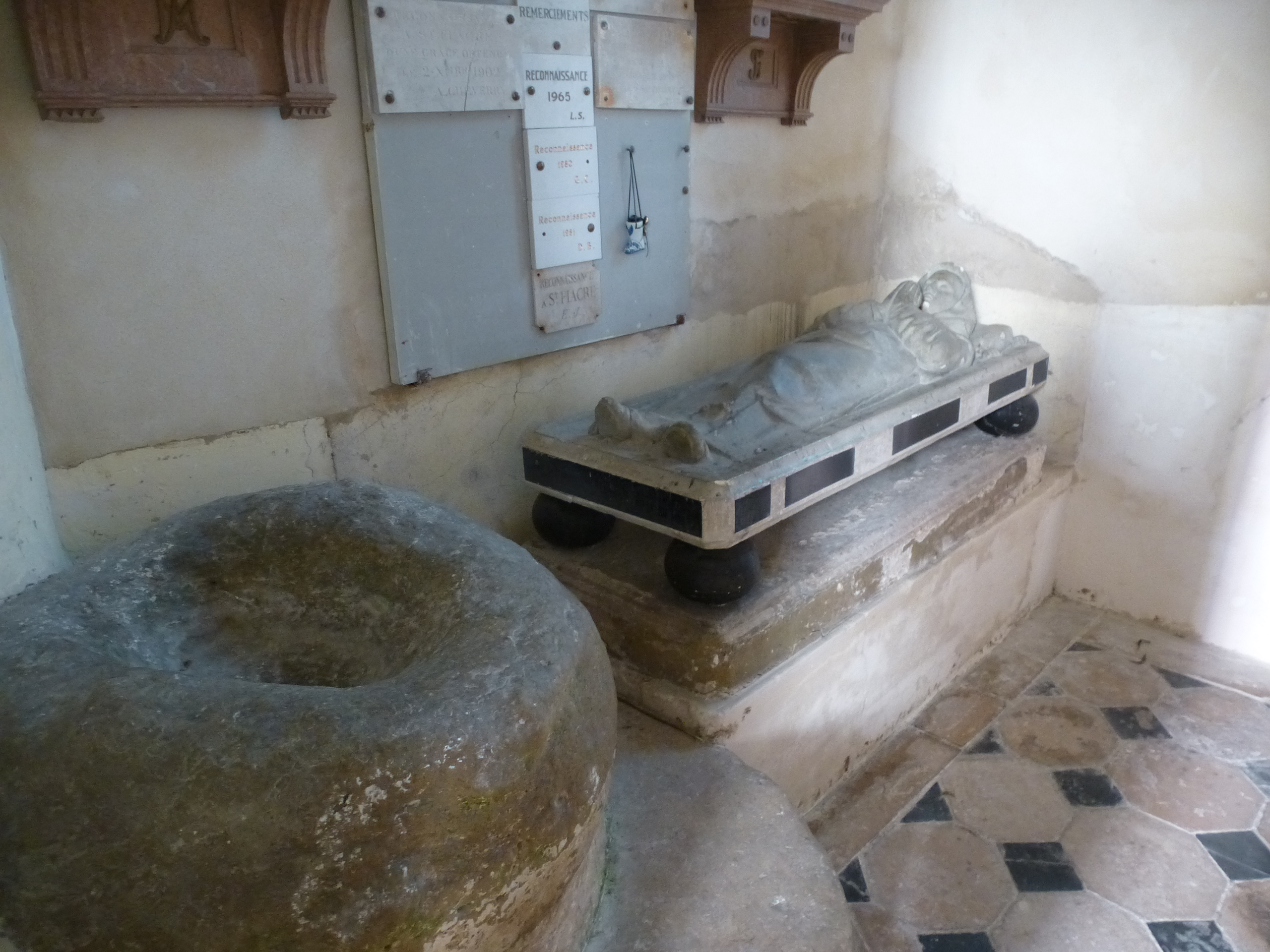 Pierre dite « de Saint-Fiacre », église Saint-Fiacre de Saint-Fiacre. (Seine-et-Marne, région Île-de-France).